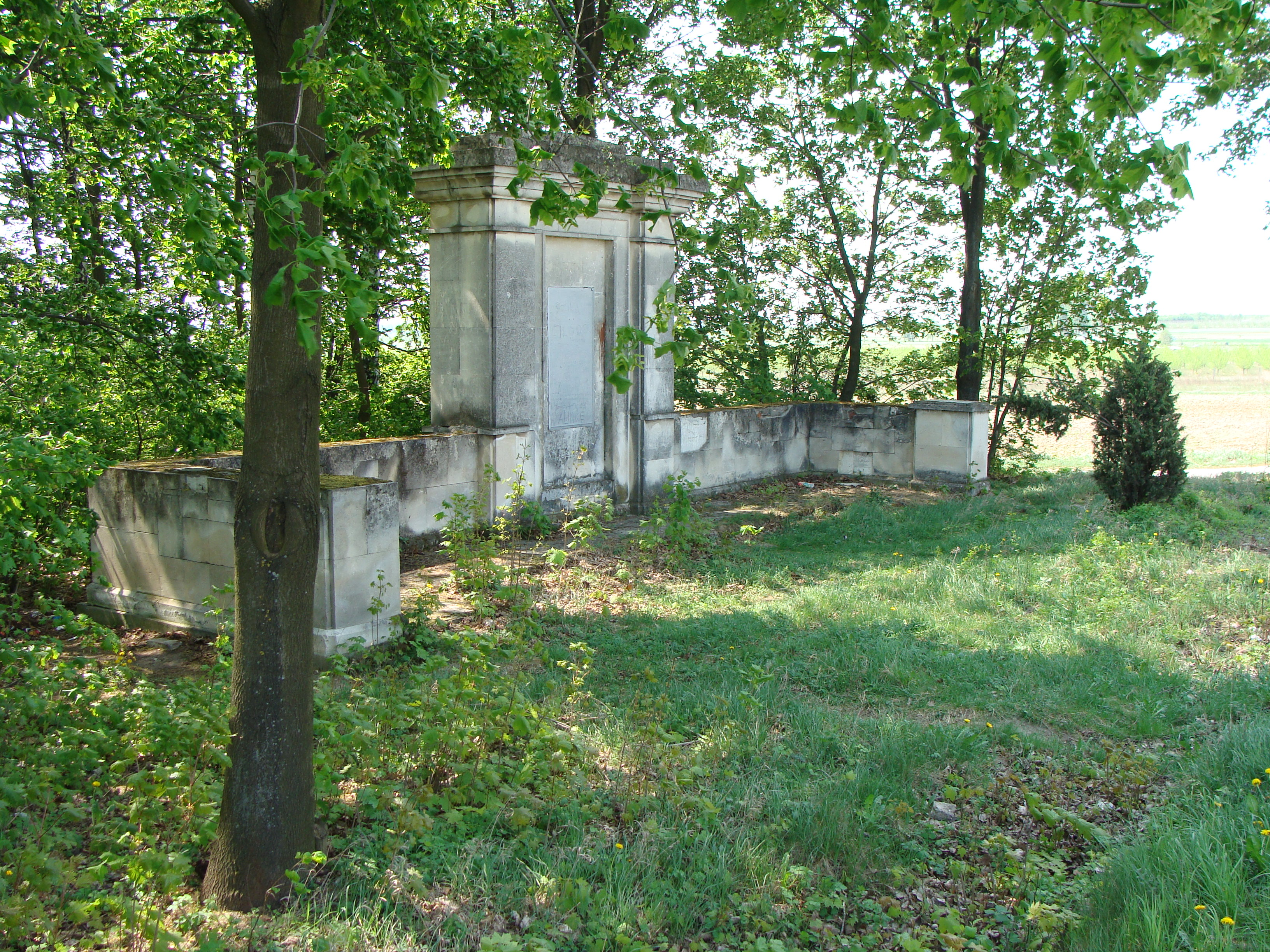 Pomnik w miejscowości Mokre upamiętniający ofensywę styczniową Armii Czerwonej rozpoczętą 12 stycznia 1945 r. z przyczółka baranowsko-sandomierskiego